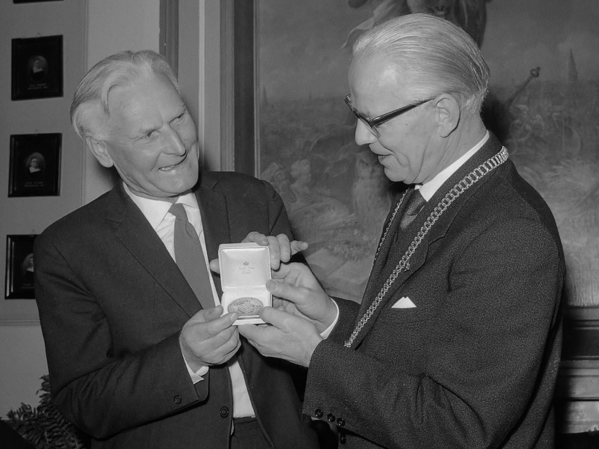 Uitreiking Hendrik de Vriesprijs aan Belcampo, burgemeester J. Tuin van Groningen overhandigt mr. H.P. Schonfeld (Belcampo) de prijs 21 december 1960